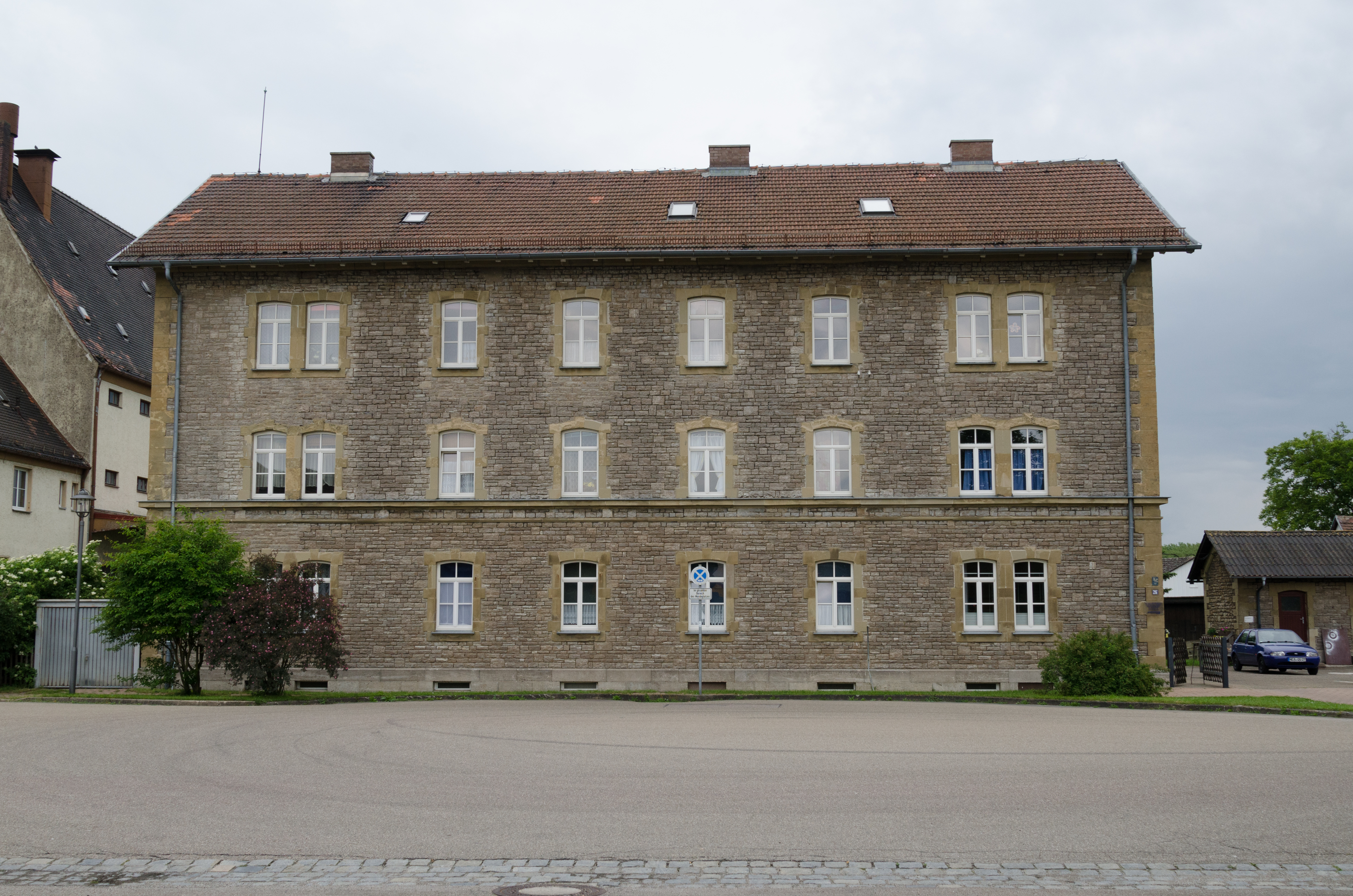 Gallmersgarten, Steinach bei Rothenburg ob der Tauber, Bahnhofstraße 26